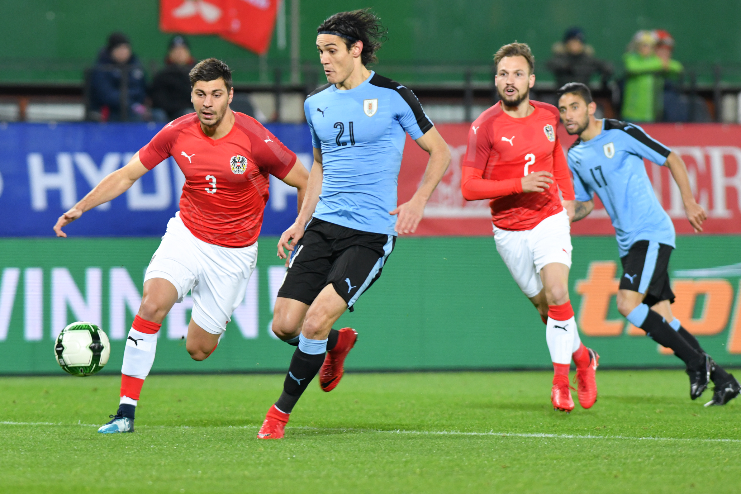 Wien, Österreich, 14.11.2017, Sport, Fussball, OEFB Freundschaftliches Laenderspiel - Österreich vs Uruguay. Bild zeigt Aleksandar Dragovic (AUT) und Edinson Cavani (URU).